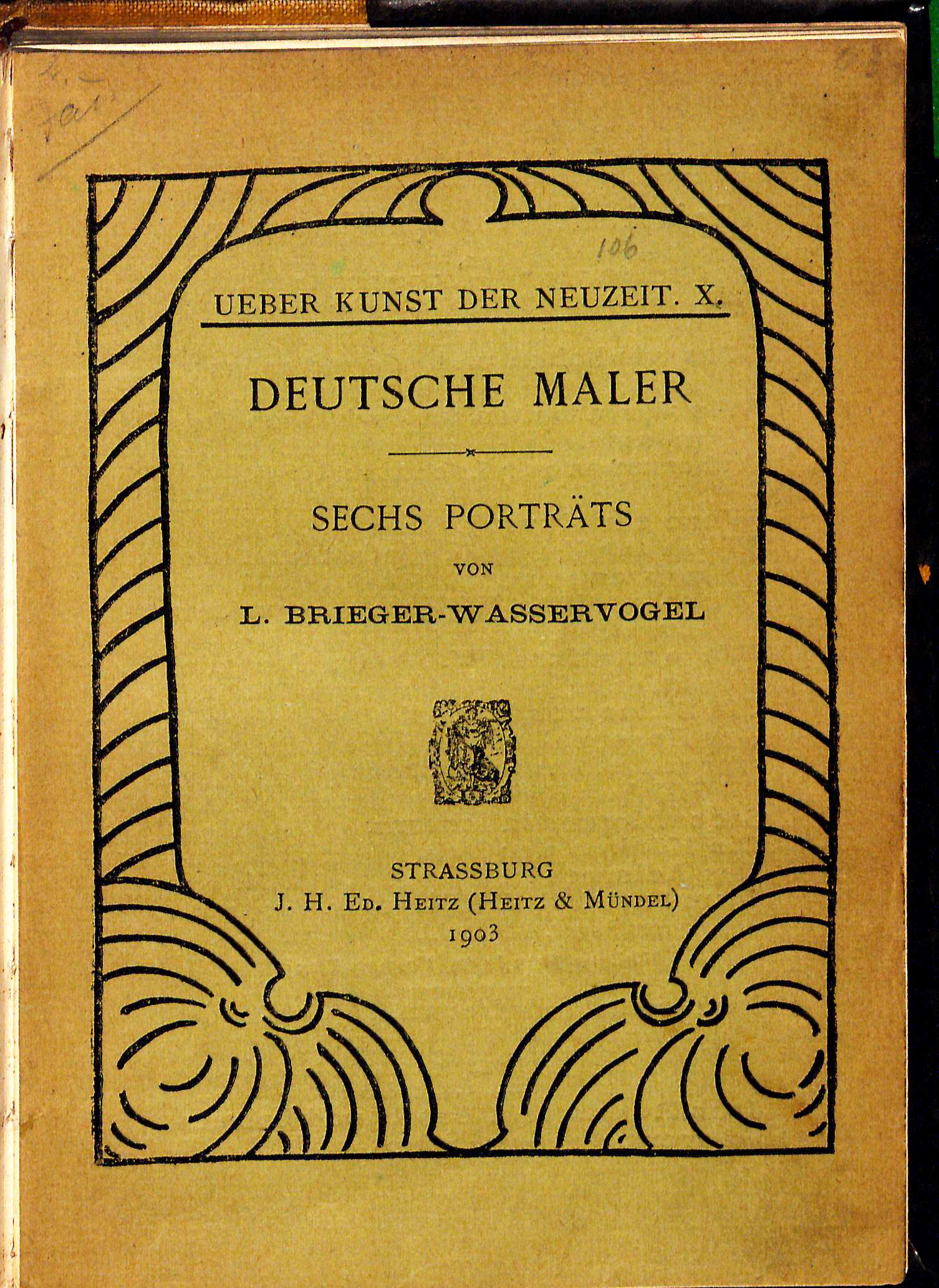 Lothar Brieger-Wasservogel Deutsche Maler 1903 Einband